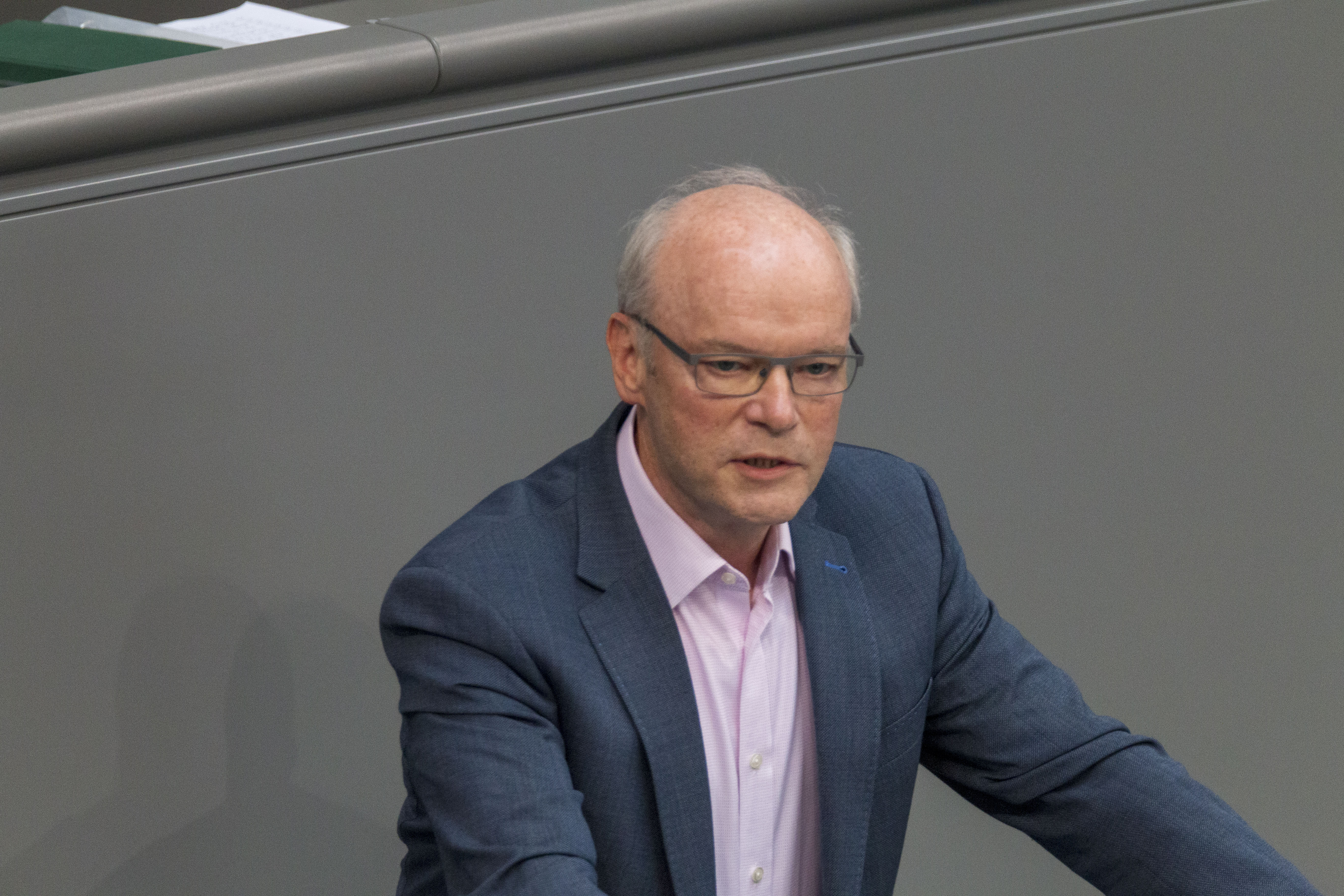 Ralf Kapschack, Bundestagsabgeordneter der SPD während der Plenarsitzung des Deutschen Bundestages am 2. Juli 2020 in Berlin.